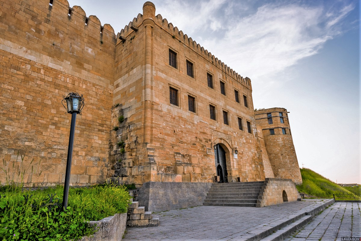 Главный вход в цитадель Нарын-Кала